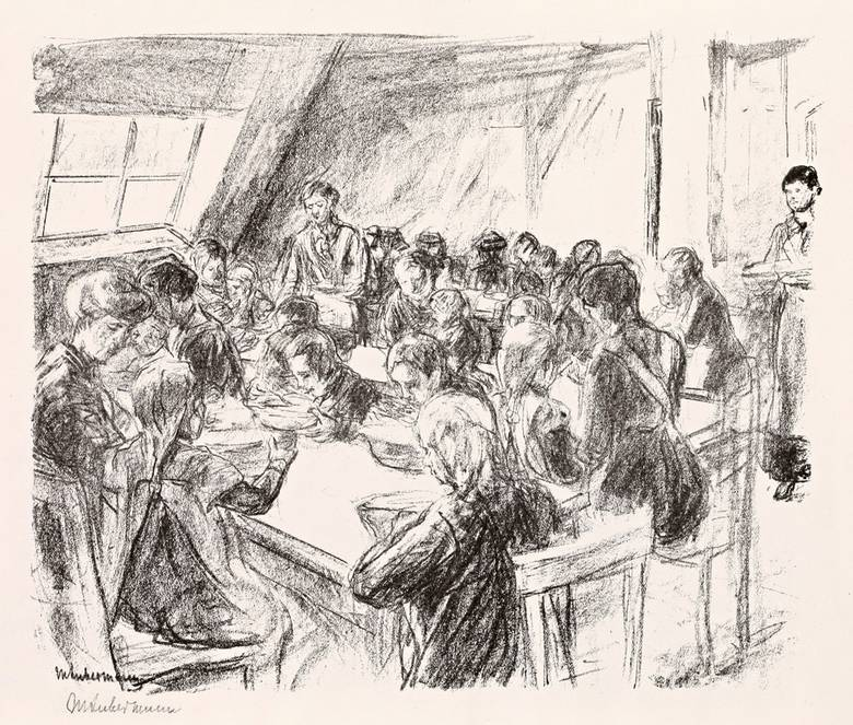 Kindervolksküche. Lithographie auf Zanders-Bütten. 24 x 28,8 cm. Signiert.